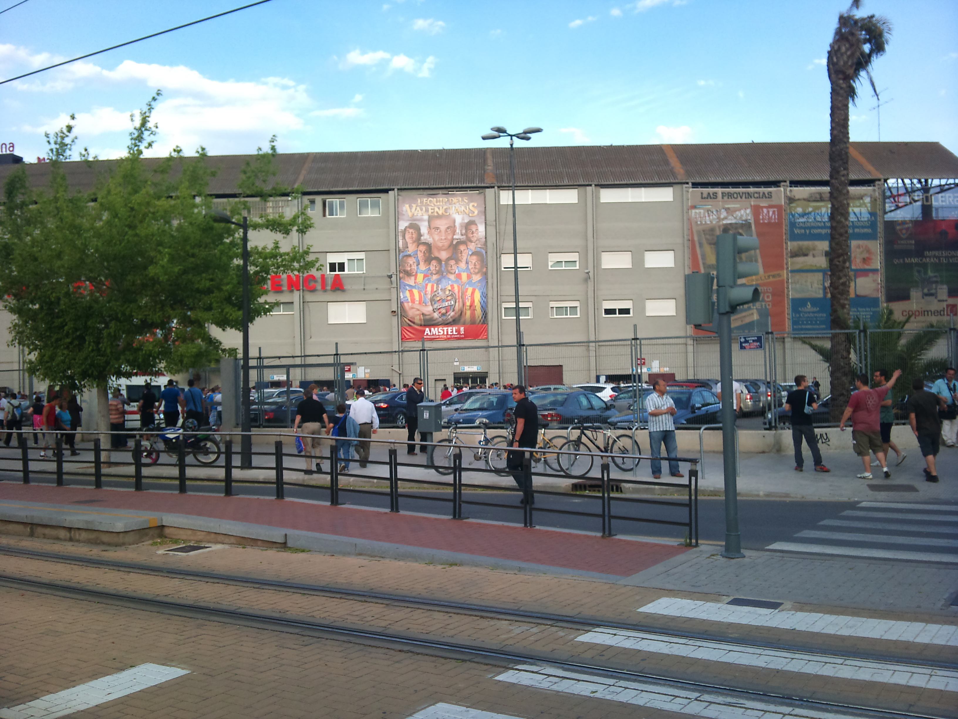 De Metrovalencia (tramvia)